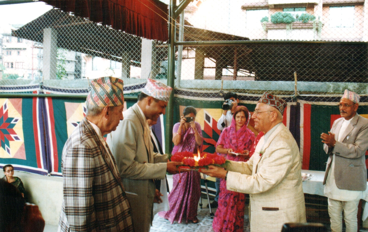 नेपाली: २०५६ सालको मदन पुरस्कार ग्रहण गर्दै कवि दिनेश अधिकारी, १३ असोज २०५७